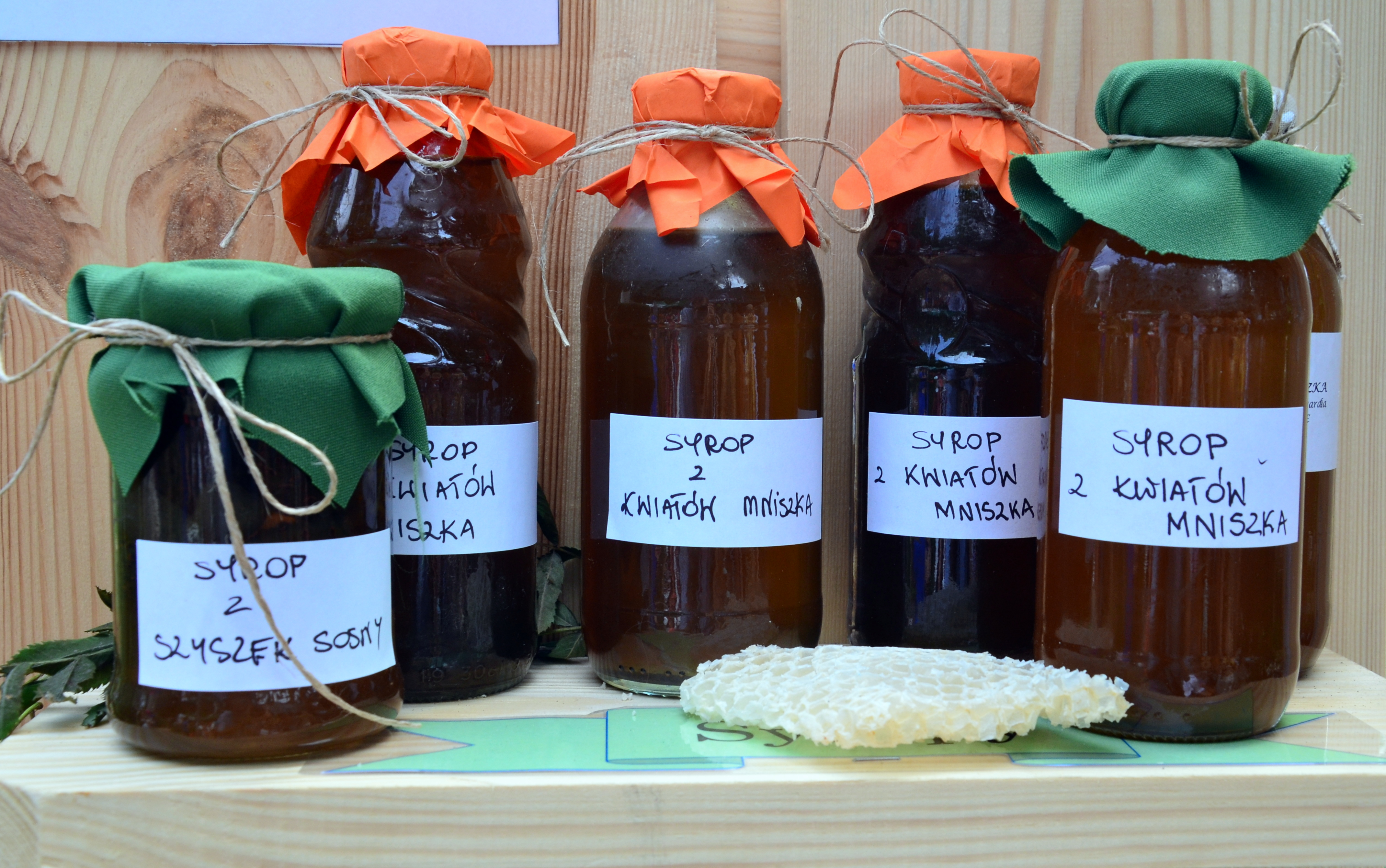 Früchte-Kräuter und Blumen einmachen